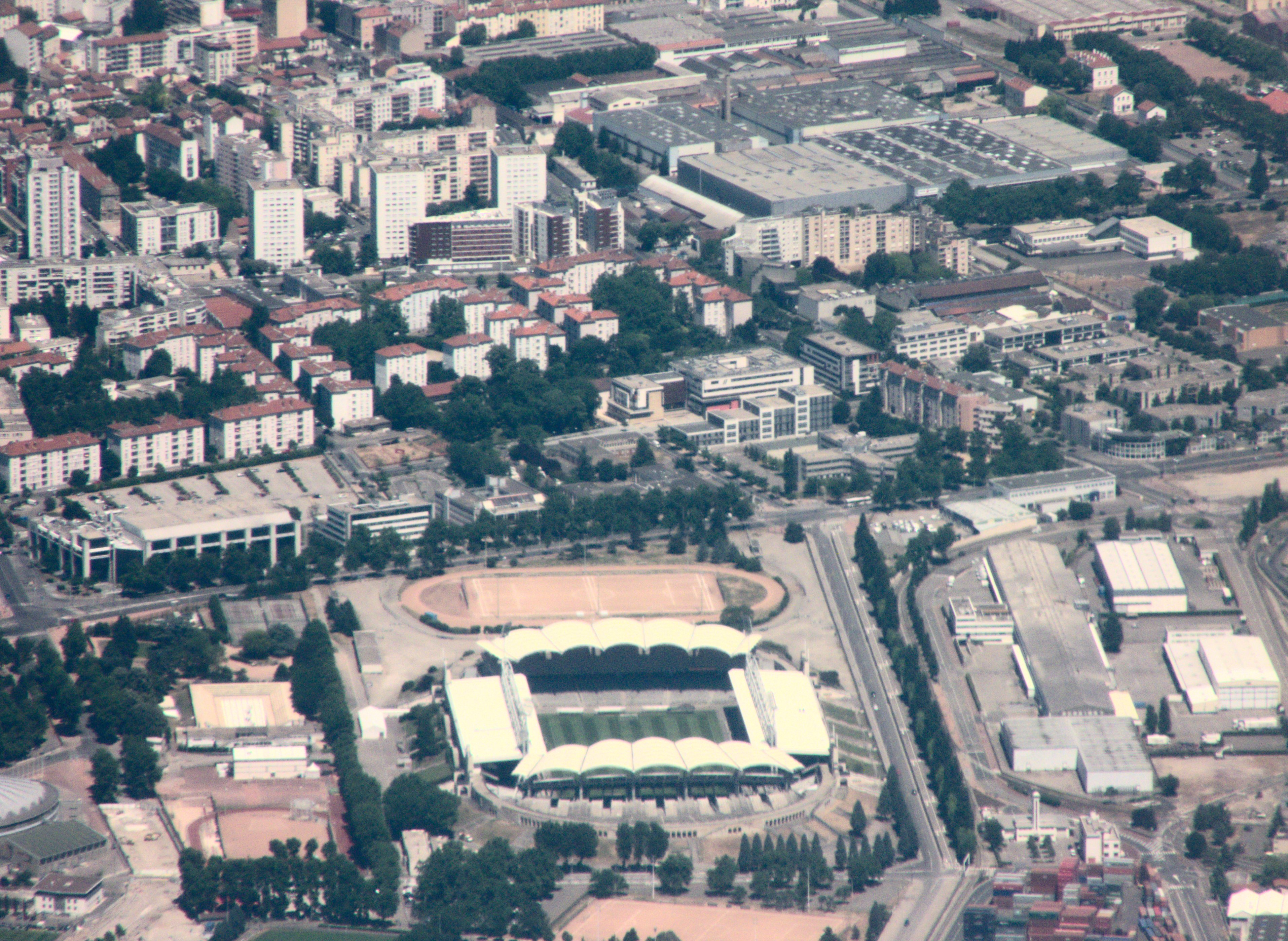 Stade de Gerland, Lyon, France